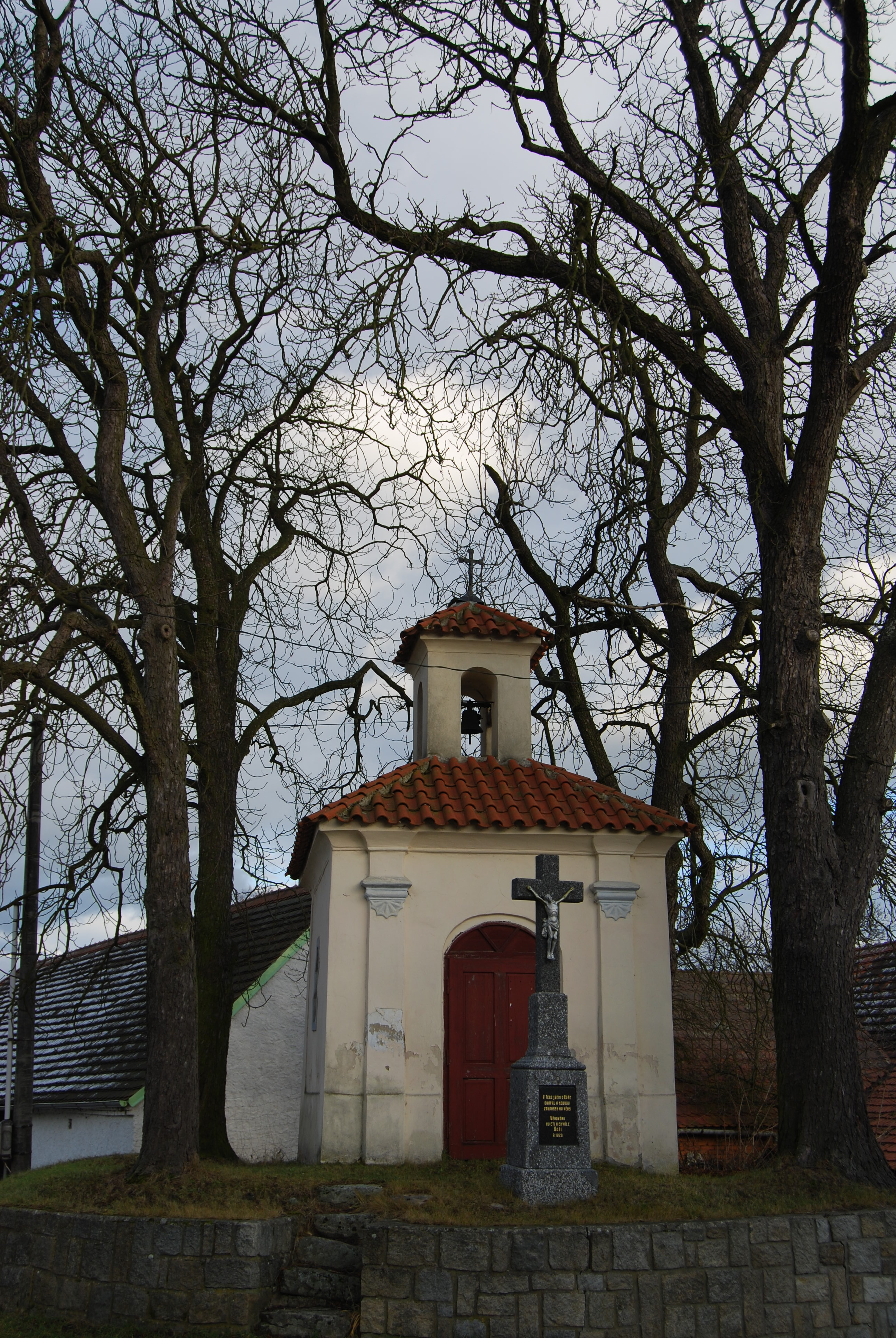 Kaple s křížem v obci. Dobešice je malá vesnice, část obce Kluky v okrese Písek. Česká republika.